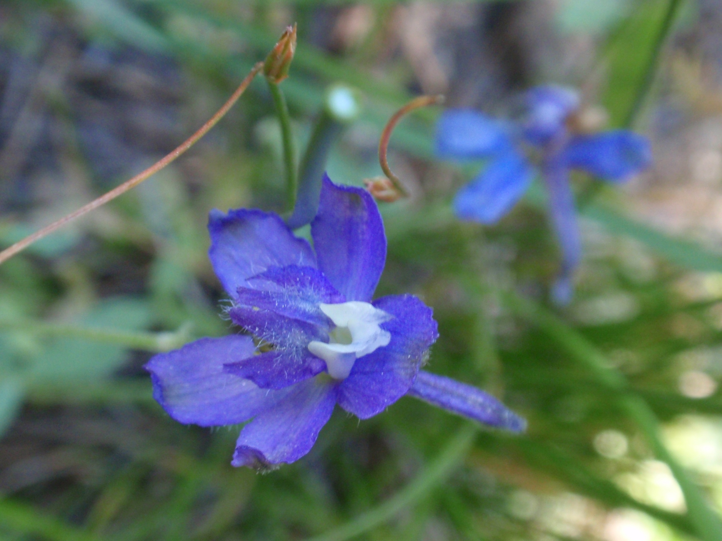 Delphinium 07